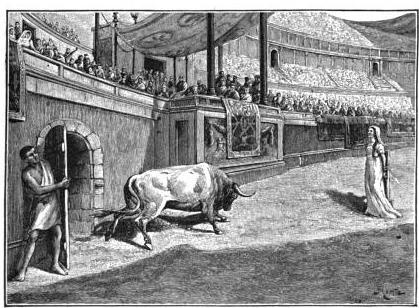 Illustration tirée de Histoire de France, cours élémentaire, Ernest Lavisse, Armand Colin, 1913, page 9 de l'éditon Heath de 1919.